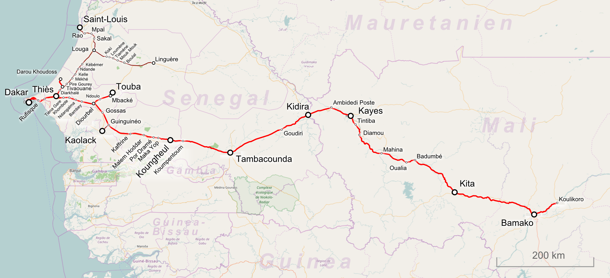 Karte der Bahnstrecke Dakar–Niger